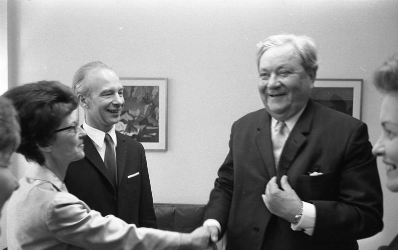 Abschiedsempfang von Senator Dr. Ernst Heinsen in der Landesvertretung Hamburg (rechts: Prof. Schmid)